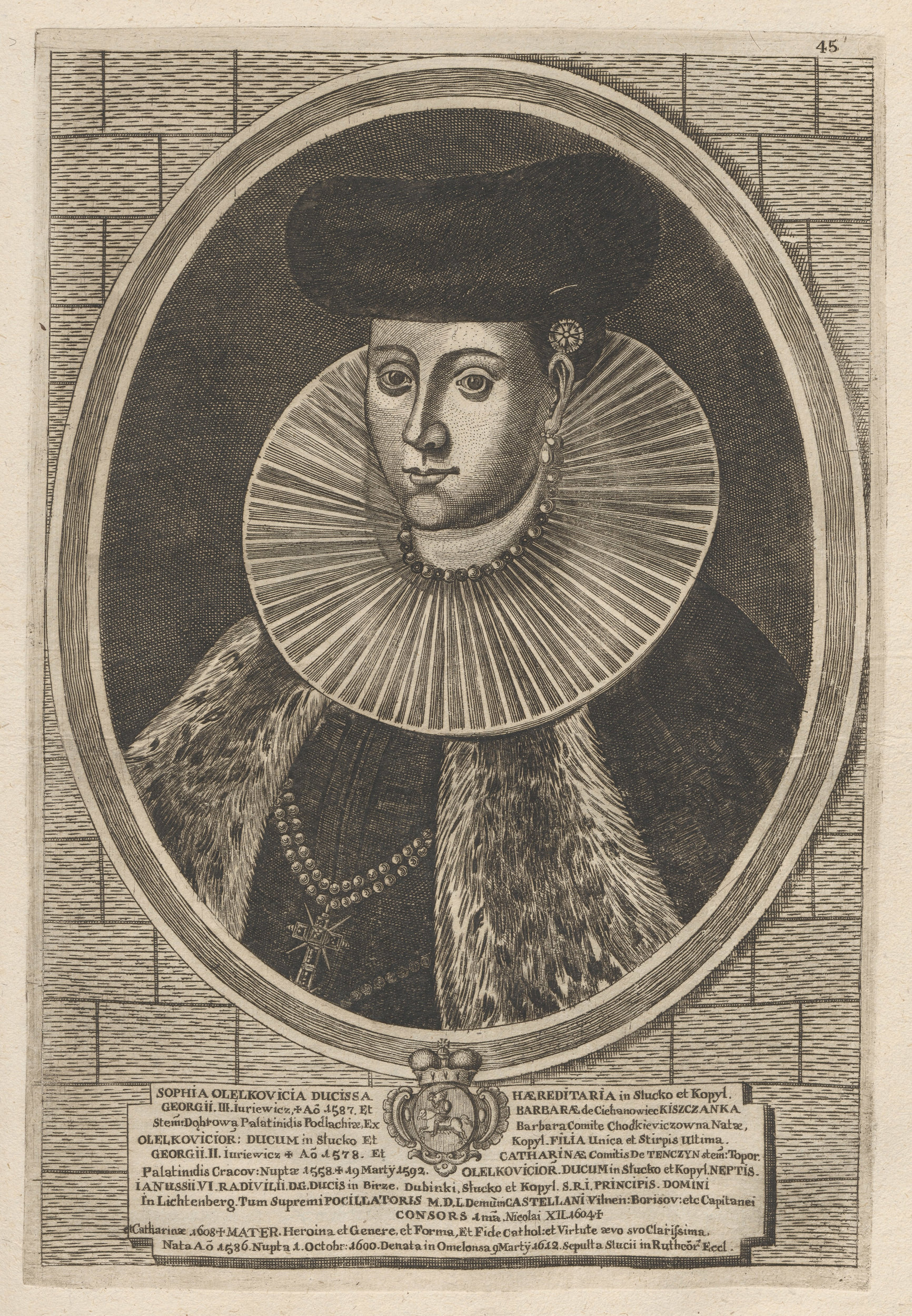 Беларуская (тарашкевіца): Партрэт Соф'і Радзівіл (Sofja Radzivił) з князёў Алелькавічаў (Alelkavič)